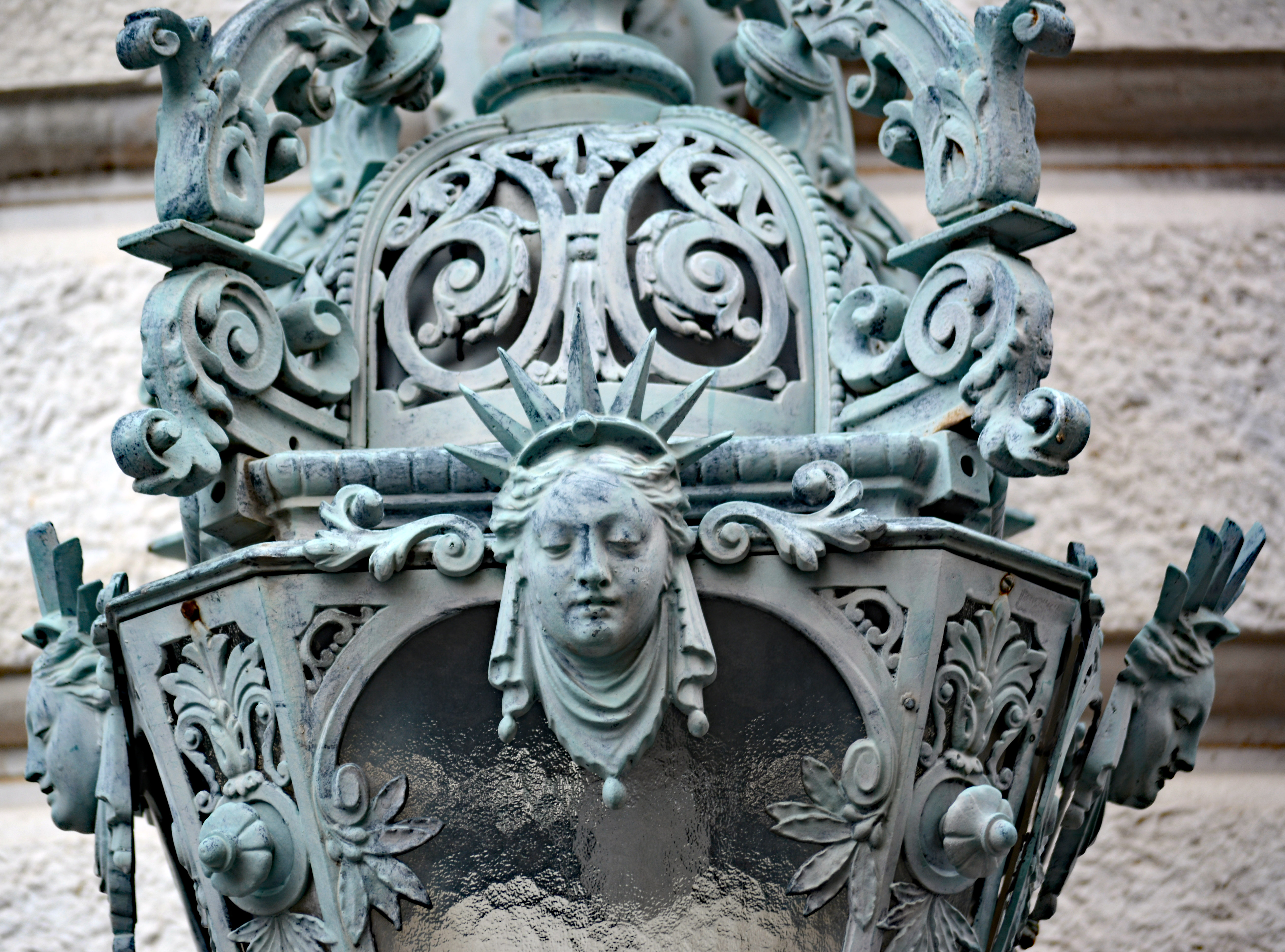 Opera de Nice, Nice, Provence-Alpes-Côte d'Azur, France - Grande lanterne extérieure en bronze richement ornée, suspendue à un bras d’applique en crosse. Le luminaire est aujourd’hui électrifié, vitrée sur ses 4 faces. La crosse est accolée à un support ornementé d’une lyre. ici à l'angle de la rue Raoul Bosio et de la rue Saint-François de Paule, à Nice, sur le côté gauche de de l'Opéra de Nice (1881-1885)